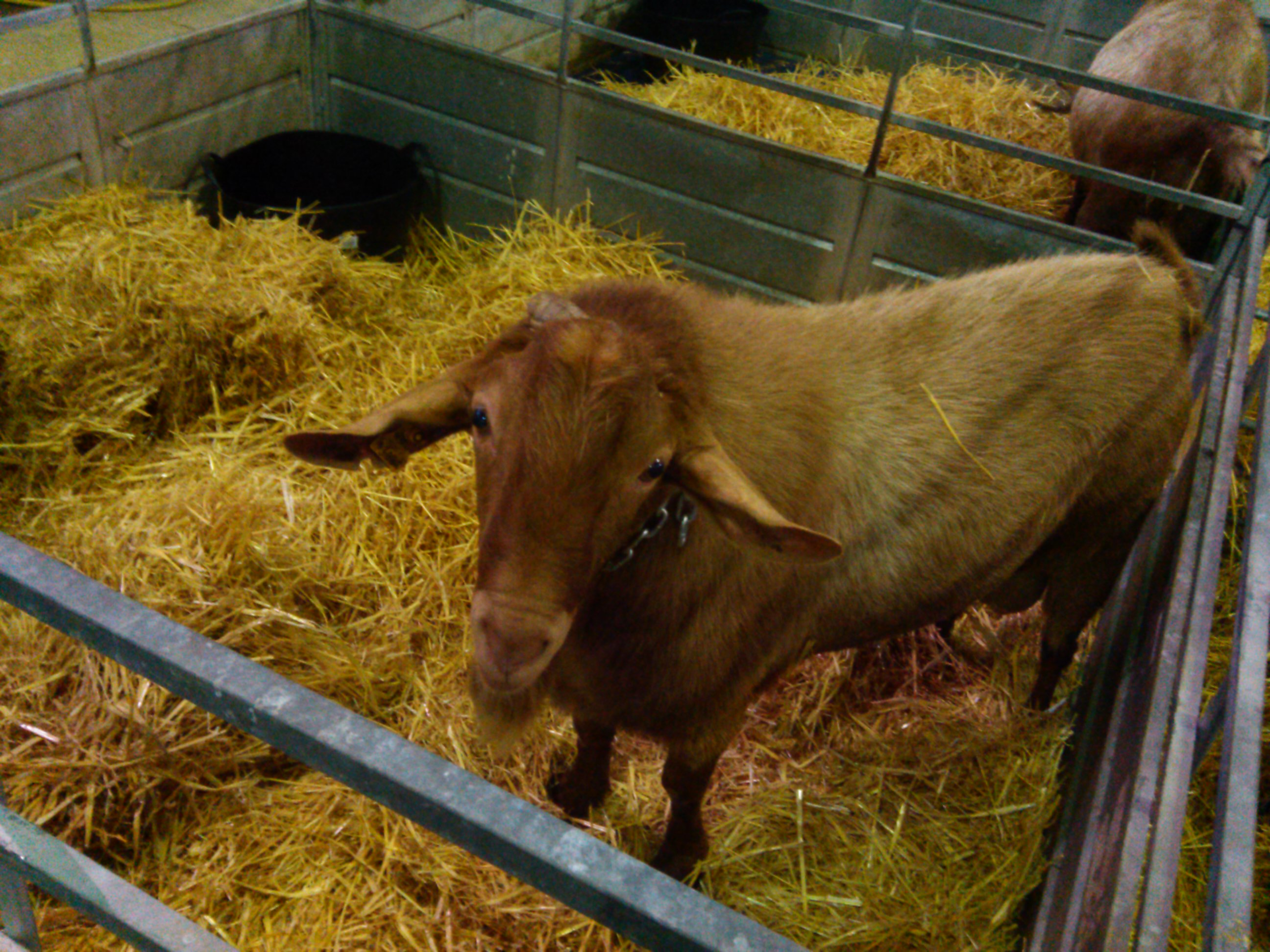 Ejemplar de cabra malagueña en FEGASUR 2015, Jerez de la Frontera (Cádiz).